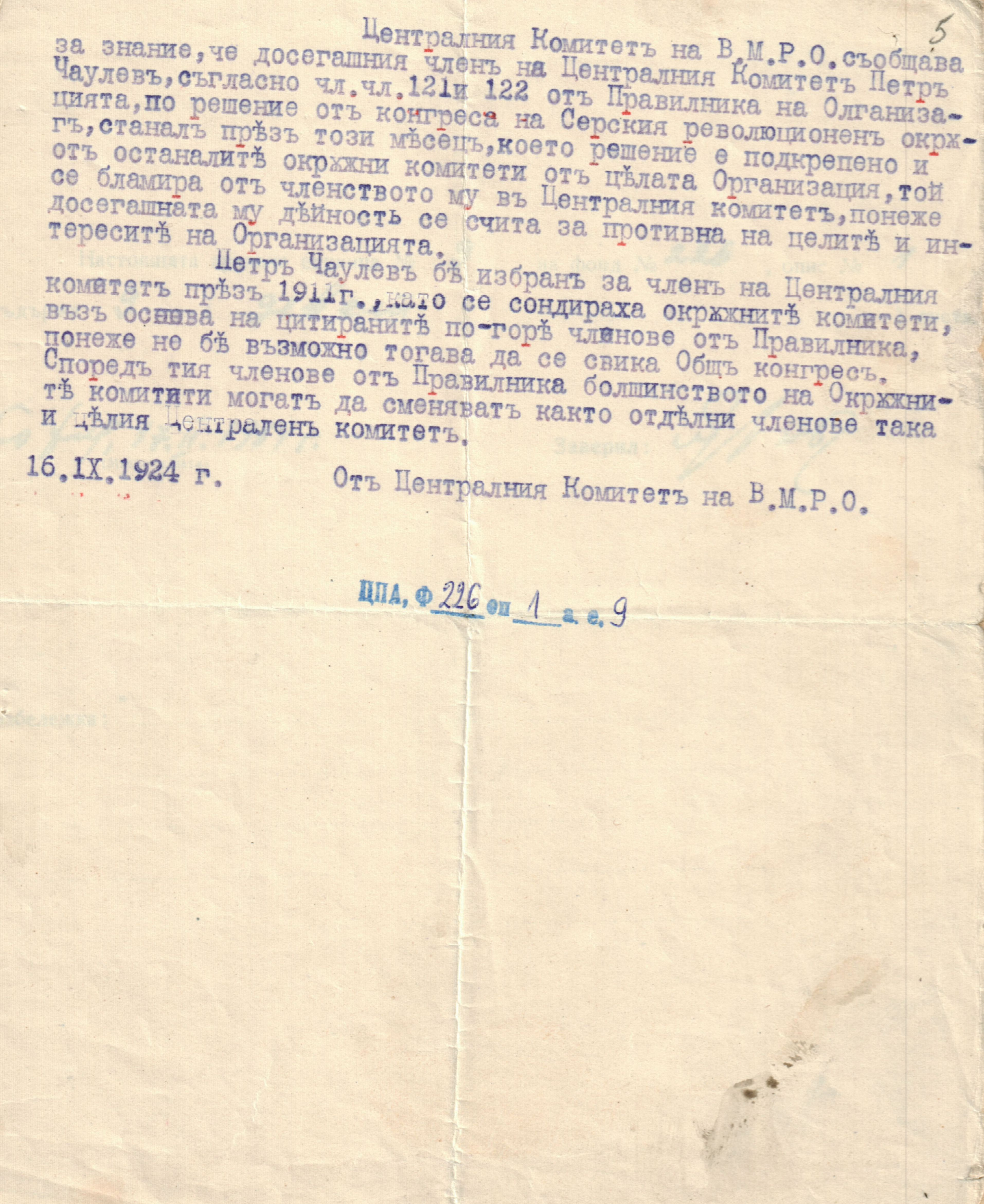 Окръжни на ЦК и ЗП на ВМРО относно дейността на организацията в Македония, отношението към БКП, бламирането на П. Чулев от състава на ЦК и др.